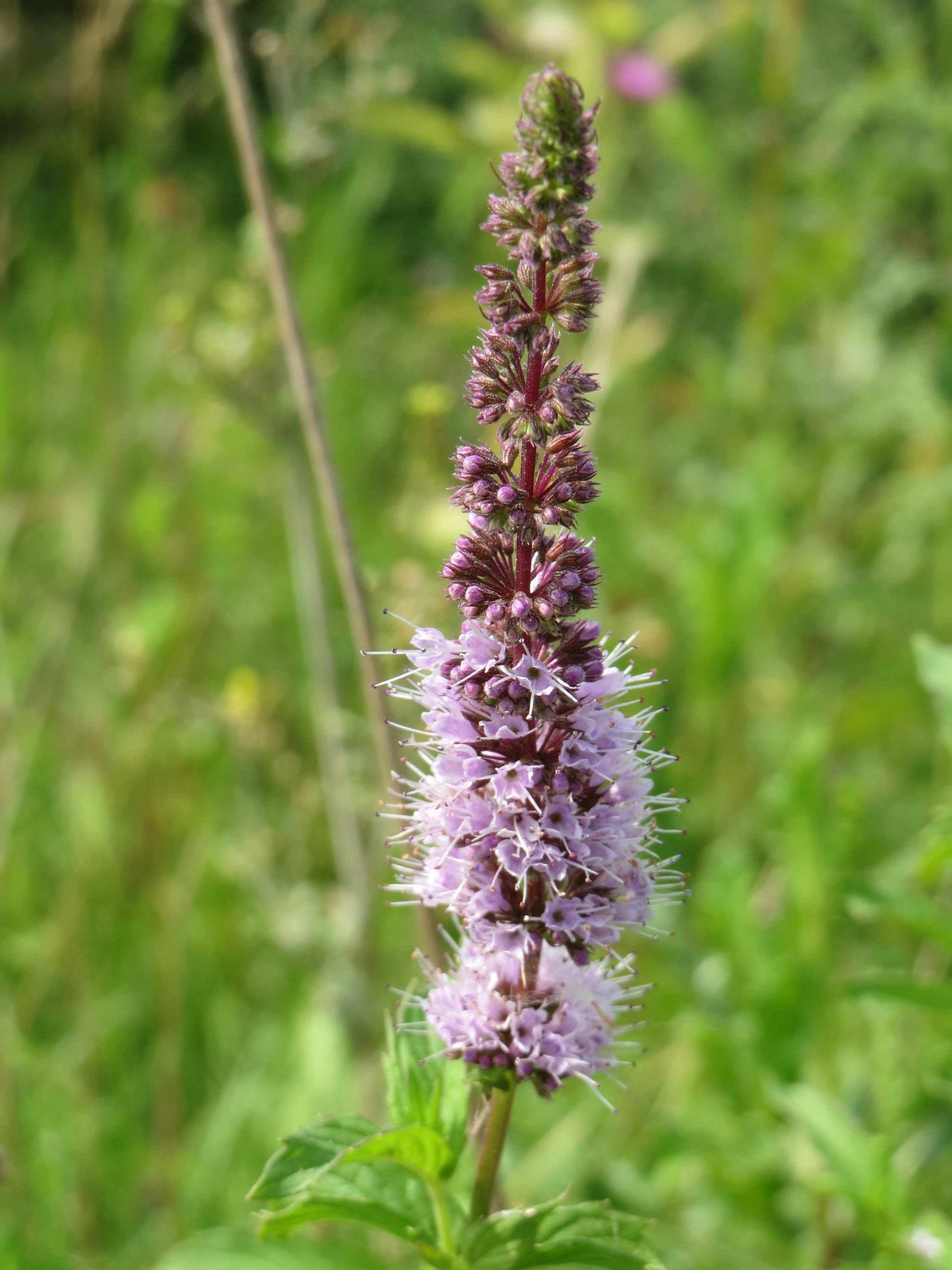 Grüne Minze (Mentha spicata) am Kriegbach bei Neulußheim (Gemarkung Altlußheim)